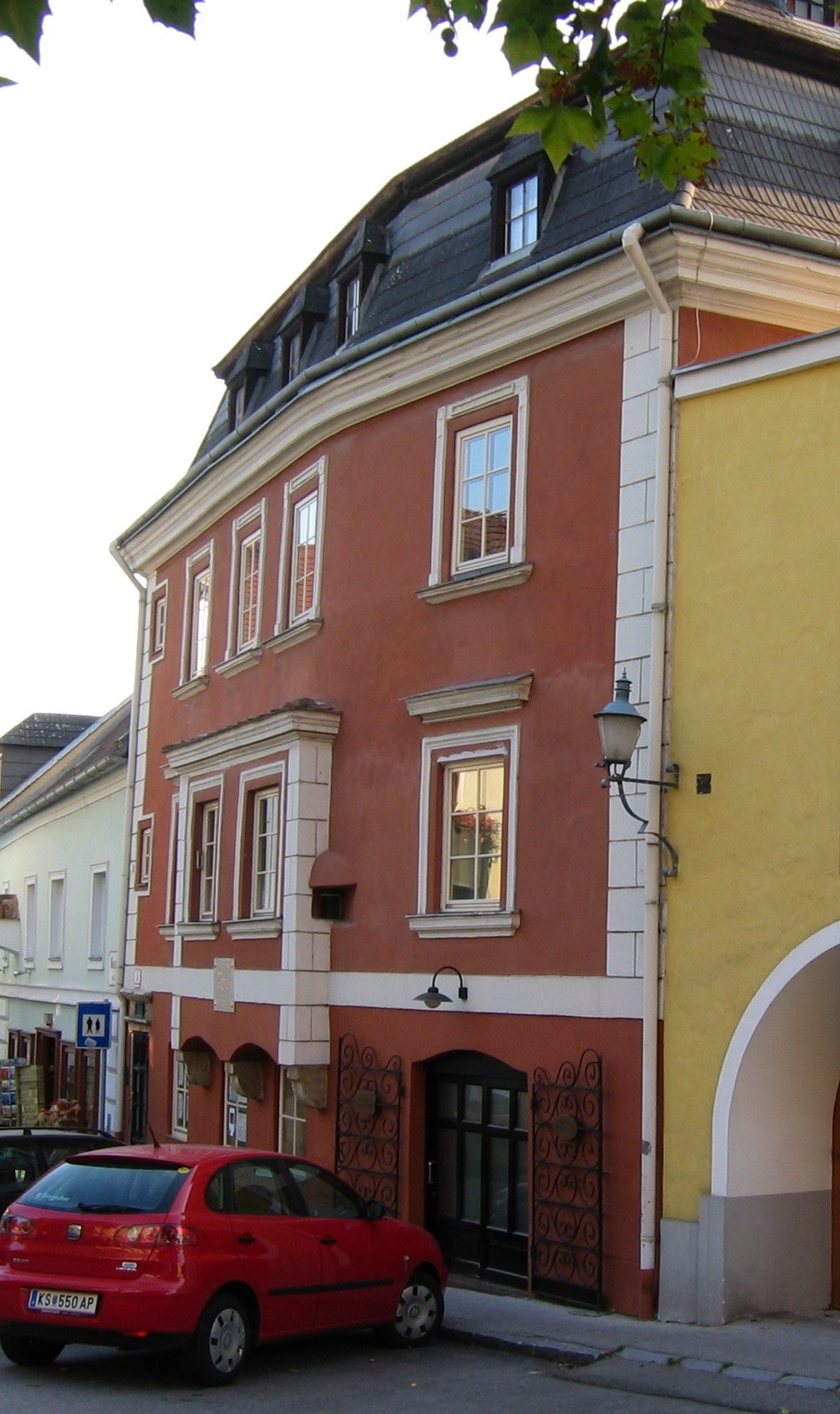 Dominikanerpl 5